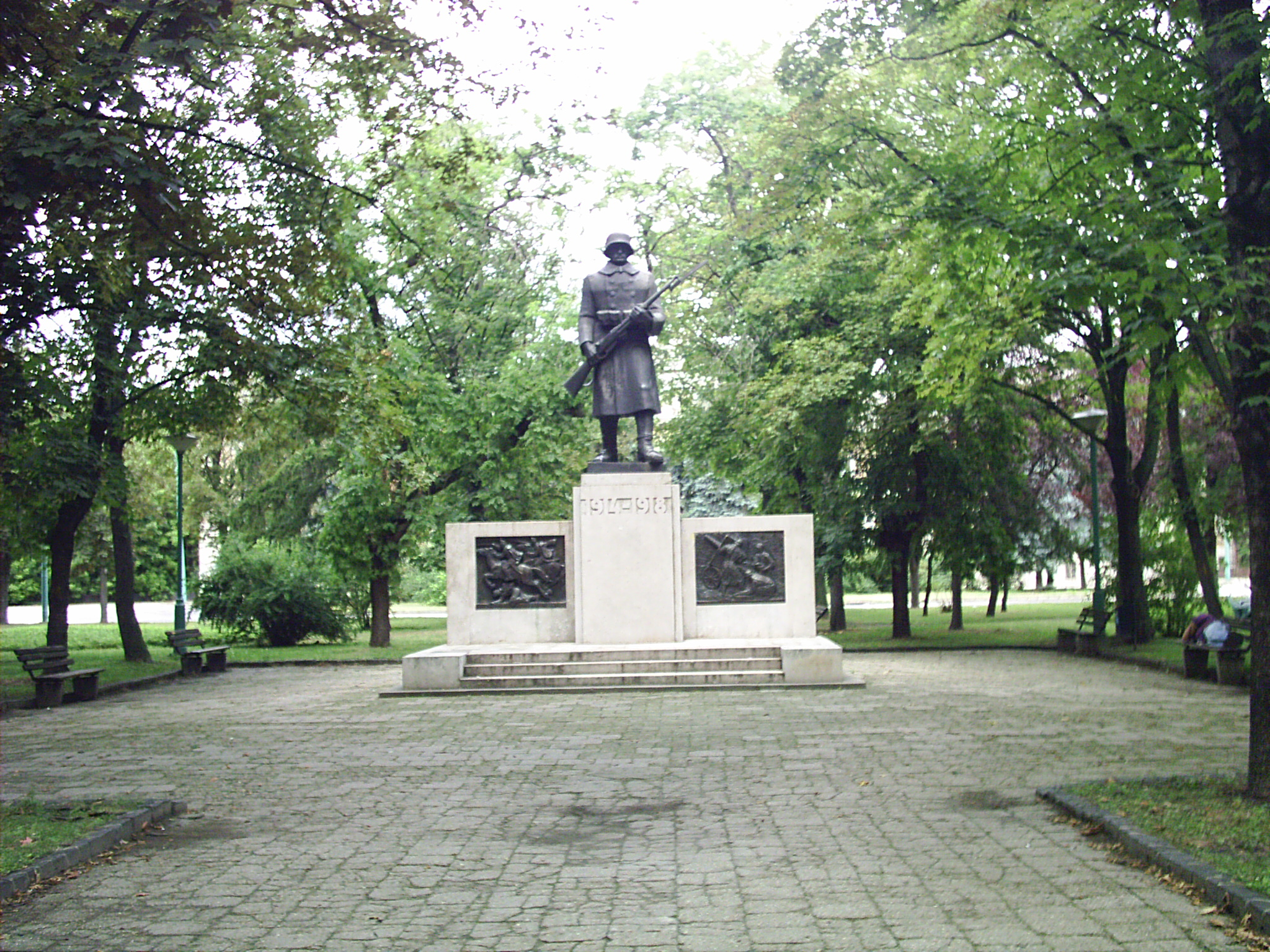 Első világháborús emlékmű, Kiskunfélegyháza (Varga Ferenc és Morell Mihály alkotása, 1941)